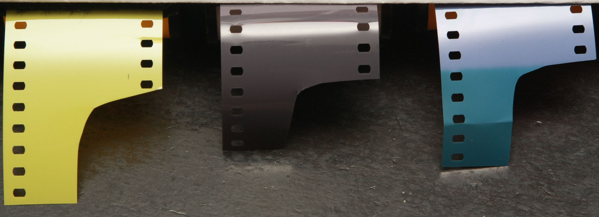 Diferentes colores del soporte de celuloide segun el contraste de la emulsión. Los soportes amarillos fomentan las copias de bajo contraste mientras que los soportes azules fomentan las copias de alto contraste en los papeles multigrado. A la izquierda emulsión de bajo contraste ISO 6, al centro, emulsión de contraste variable ISO 250, a la derecha emulsión de alto contraste ISO 25 En el caso de la película de contraste variable, este se regula con la técnica de revelado y empleando el uso de filtros de color en la ampliadora, mientras que las de contraste alto y bajo incorporan este filtro en el soporte de celuloide